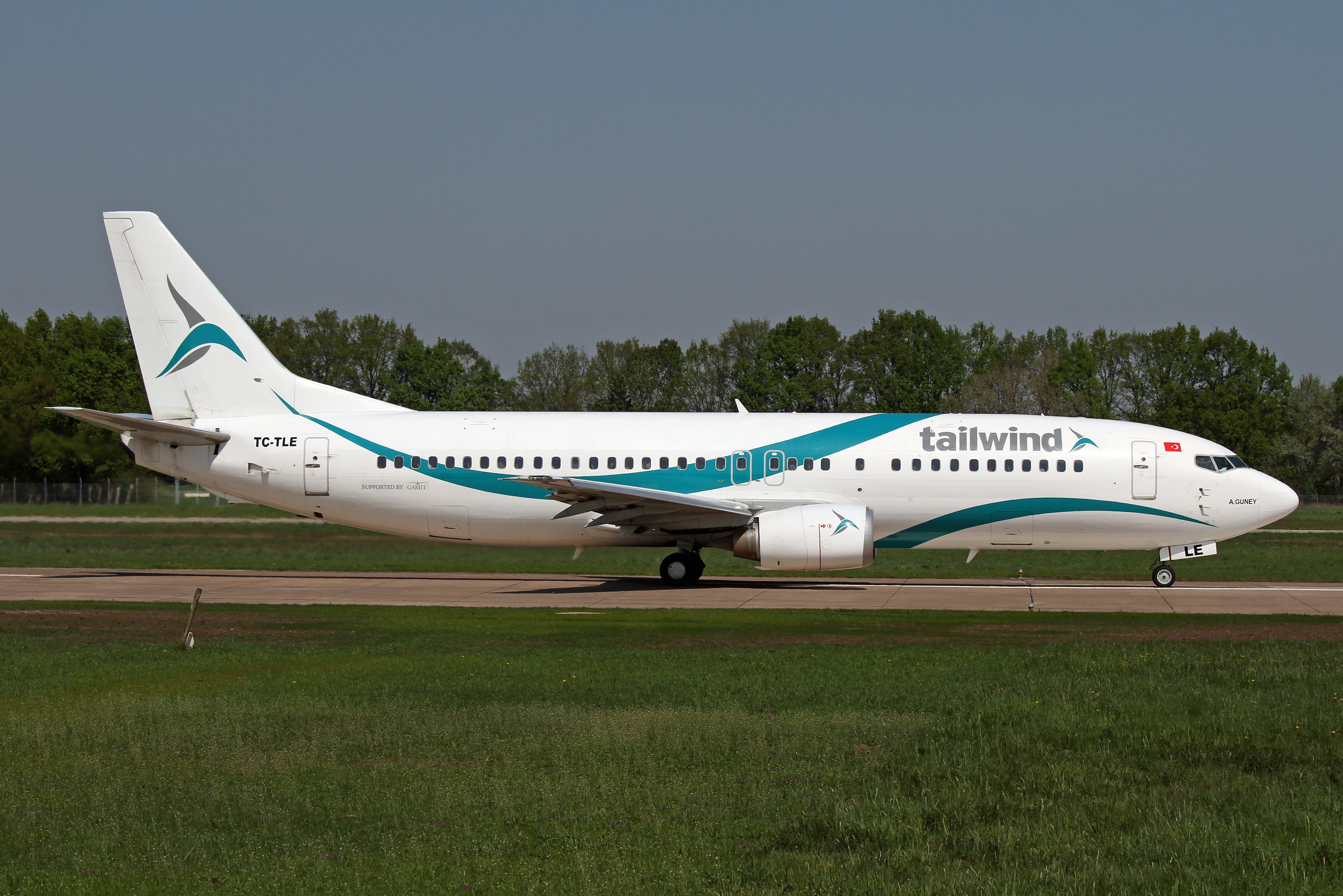 HAJ/EDDV 24-04-11